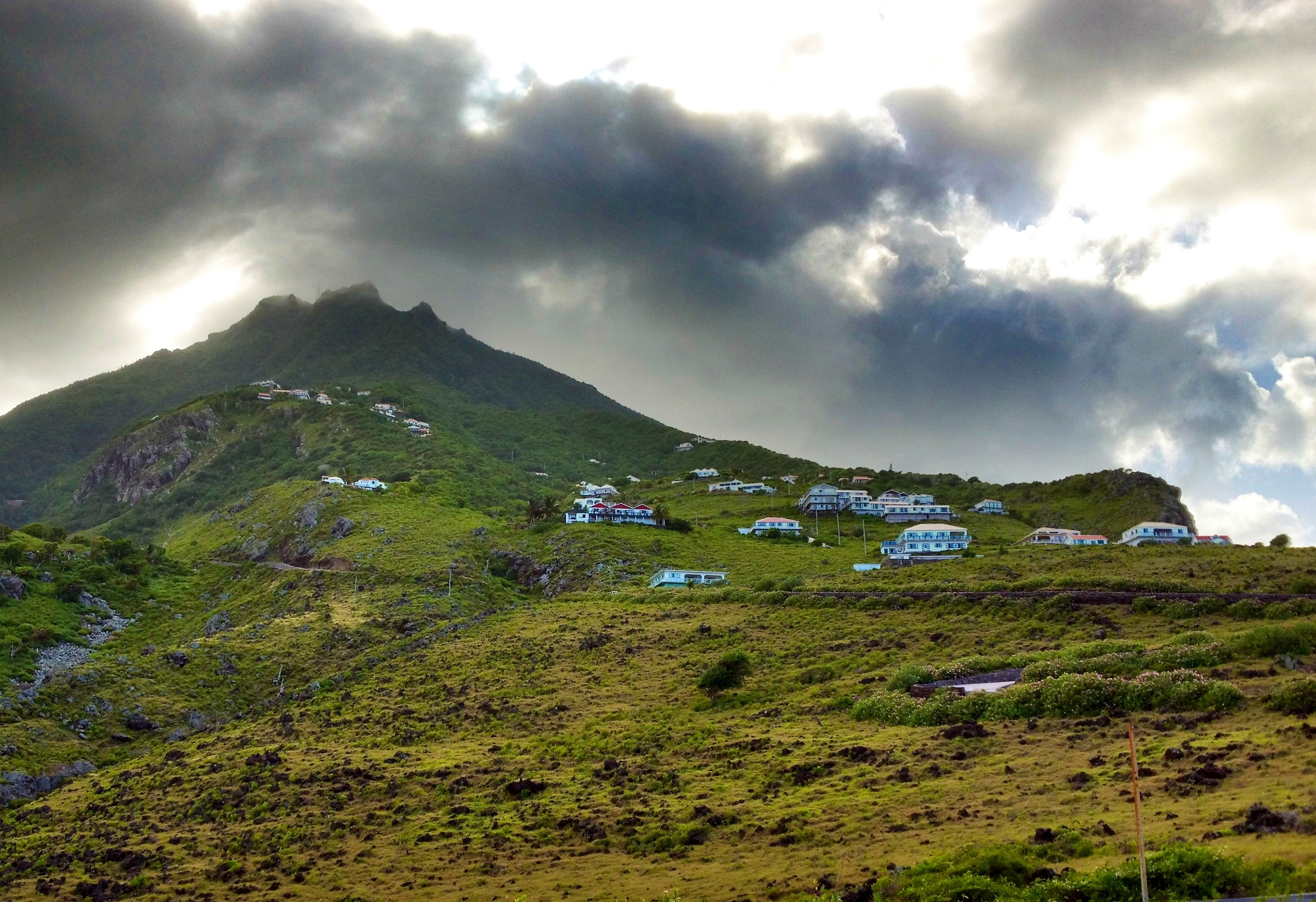 Vue sur Hell's Gate depuis l'aéroport